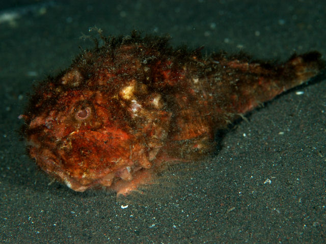 ダルマオコゼ Erosa erosa